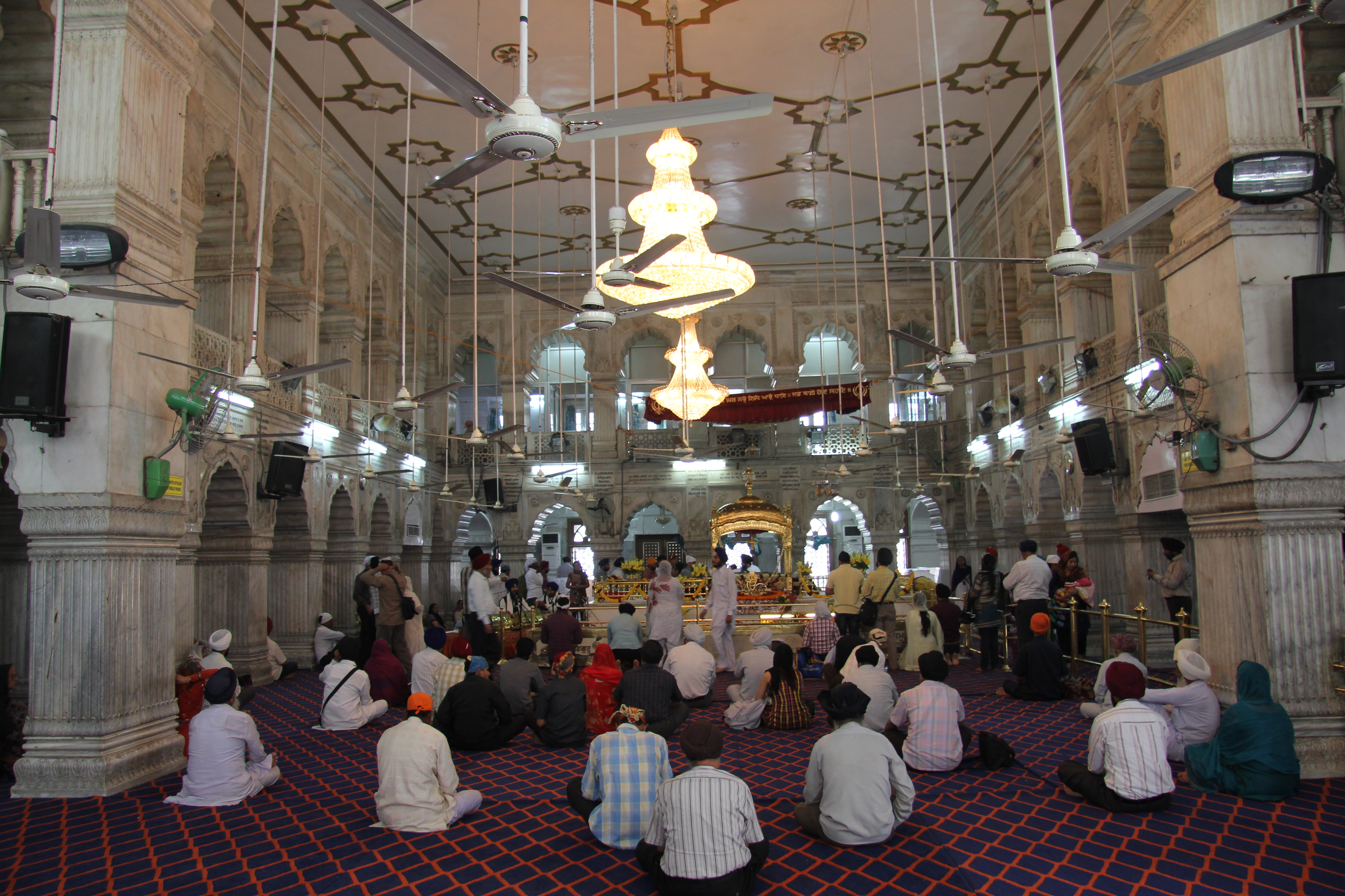 Shabad kirtan at Gurdwara Sis Ganj Delhi